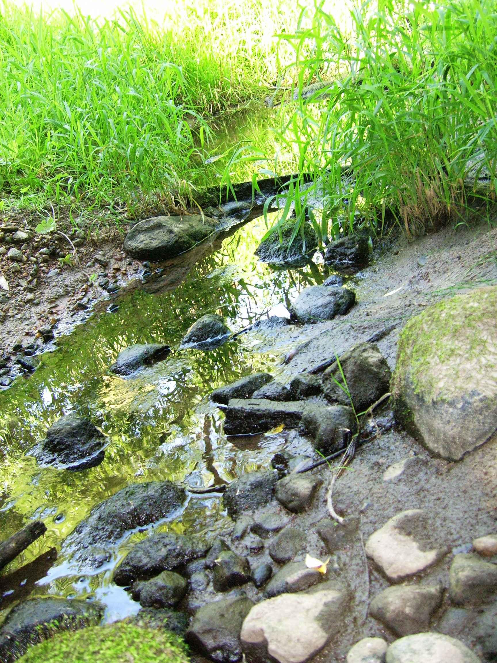 Agluona – upė Šilalės ir Tauragės rajonuose, Šešuvies dešinysis intakas.